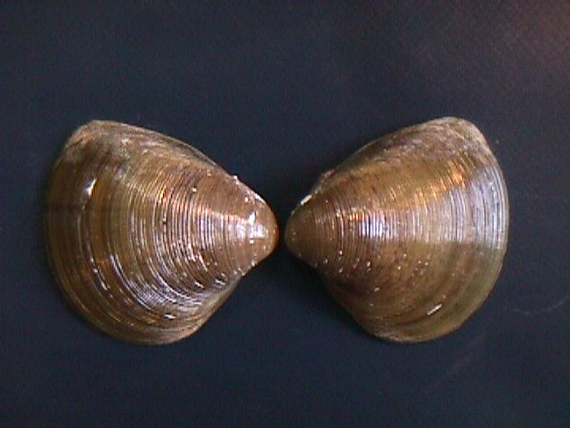 Polymesoda artacta del estuario de Maracibo, estado Zulia